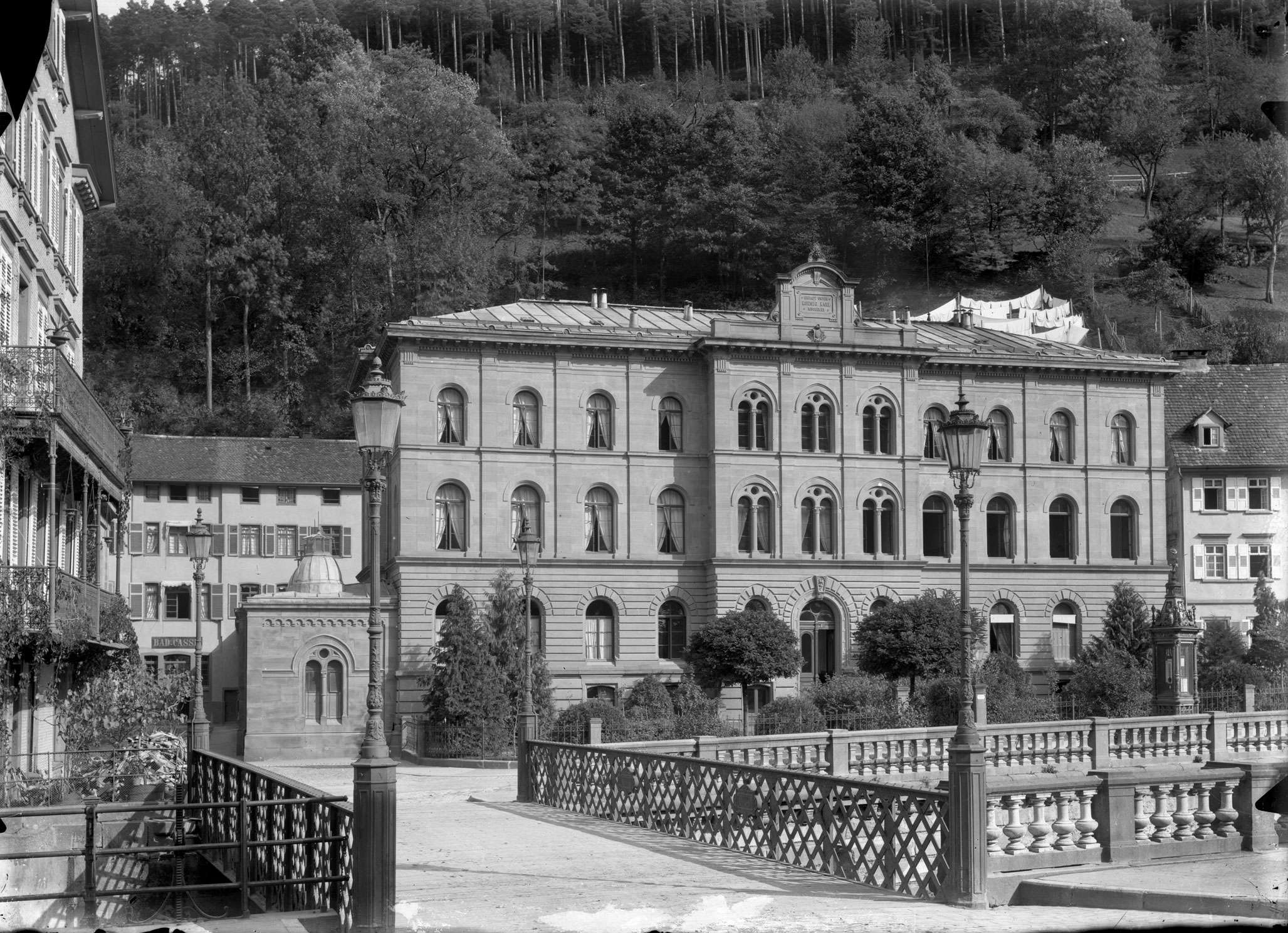 Neues Katharinenstift in Wildbad im Schwarzwald